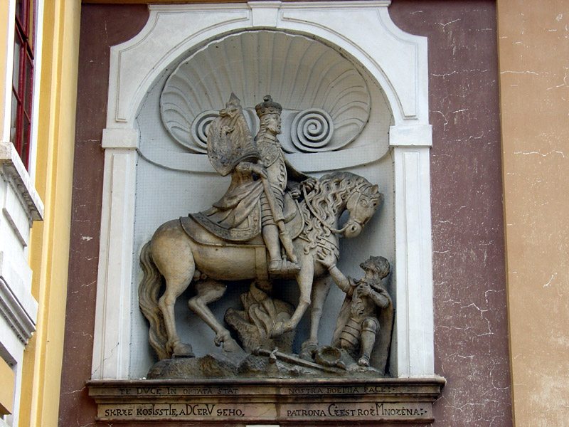 Socha svatého Václava umístěná na kostele sv. Mikuláše v Jaroměři, ČR Czech republic, Europe Author=Karelj